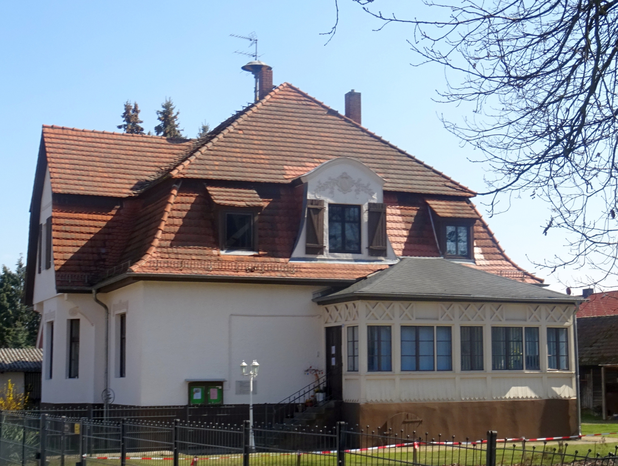 Stülpe, Gemeinde Nuthe-Urstromtal, denkmalgeschütztes Wohnhaus Kastanienallee 16